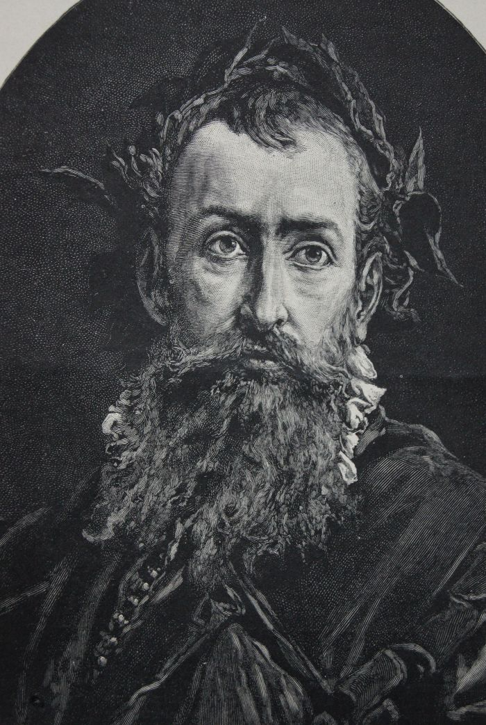 Portret Jana Kochanowskiego